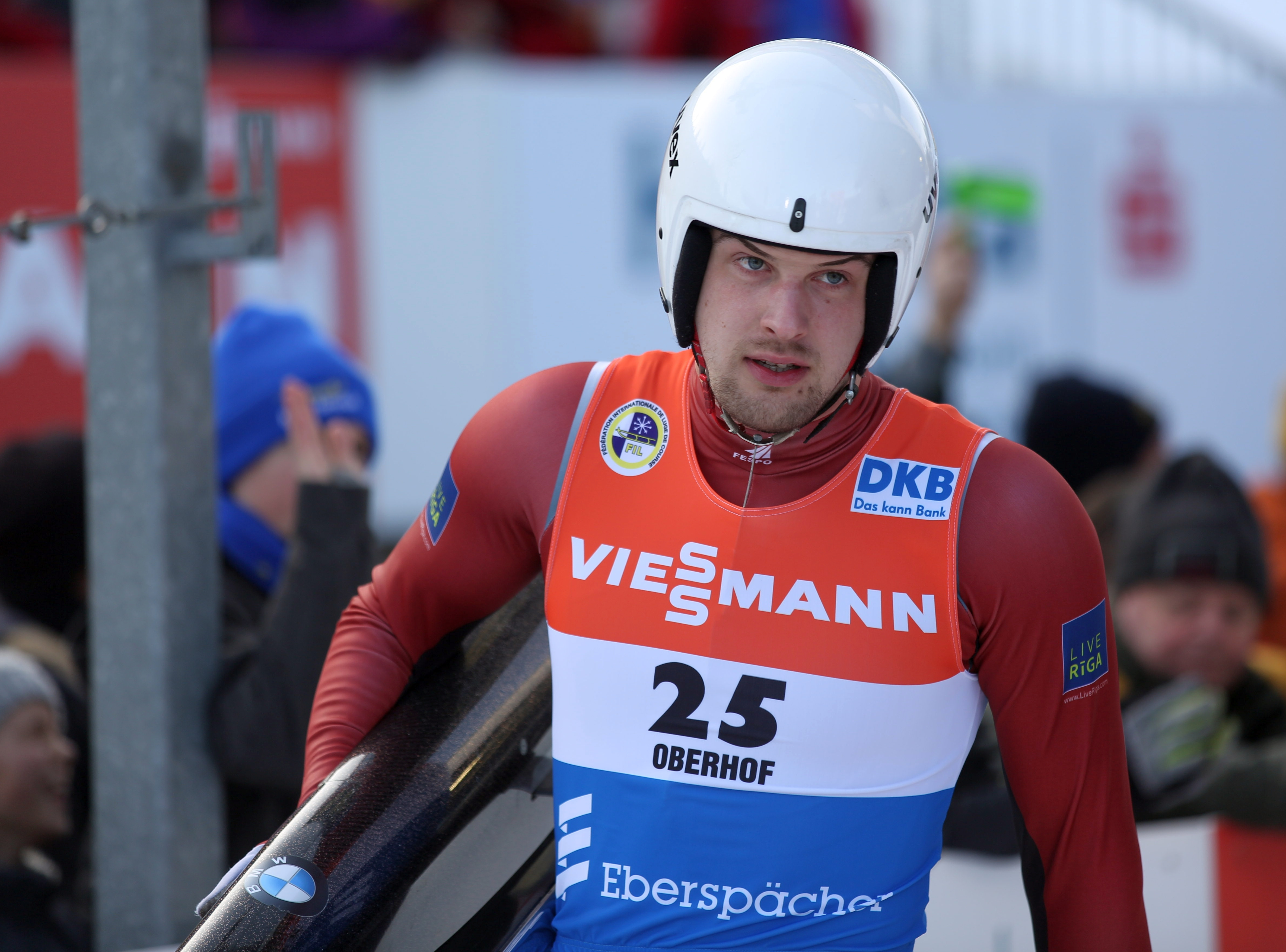 Artūrs Dārznieks beim Rennrodel-Weltcup der Männer in Oberhof 2017